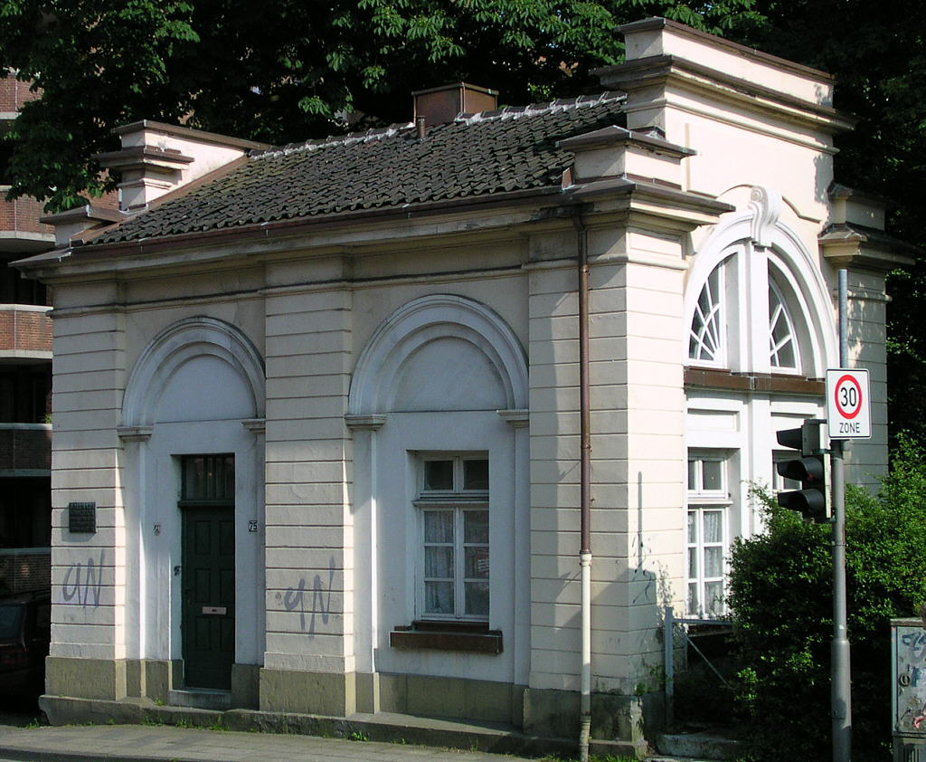 Aachen, Zoll- und Torhäuschen am Königstor, Architekt: Adam Franz Friedrich Leydel (1836)